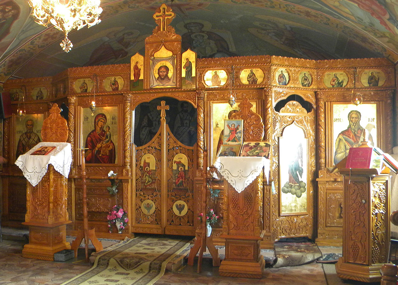 Schitul Sfantul Ilie catapeteasma